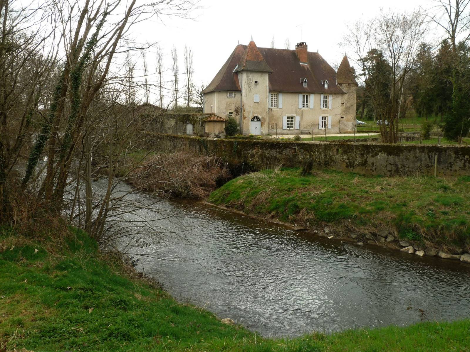 château de Chambes et la Charente, Roumazières-Loubert, Charente, France